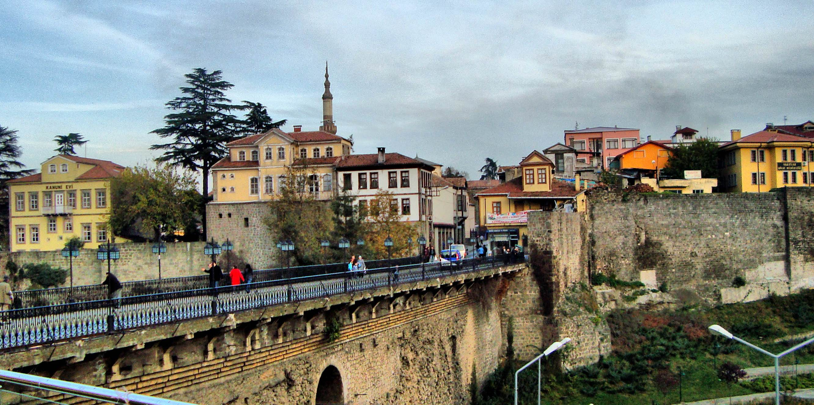 Trabzon